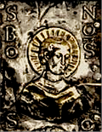 Старинное изображение, святой епископ Трира Боноз.